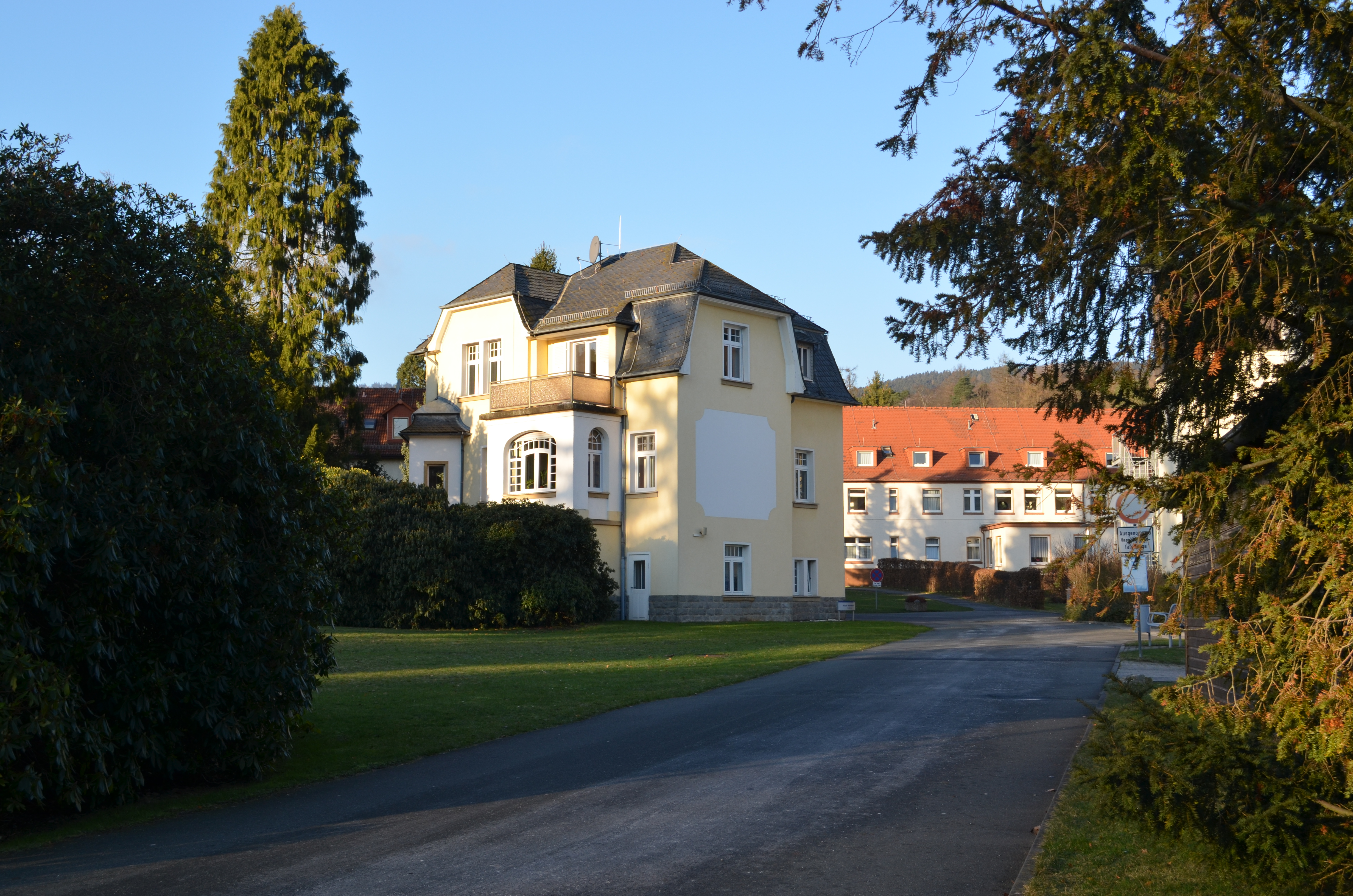 Oberursel, Klinik Hohemark